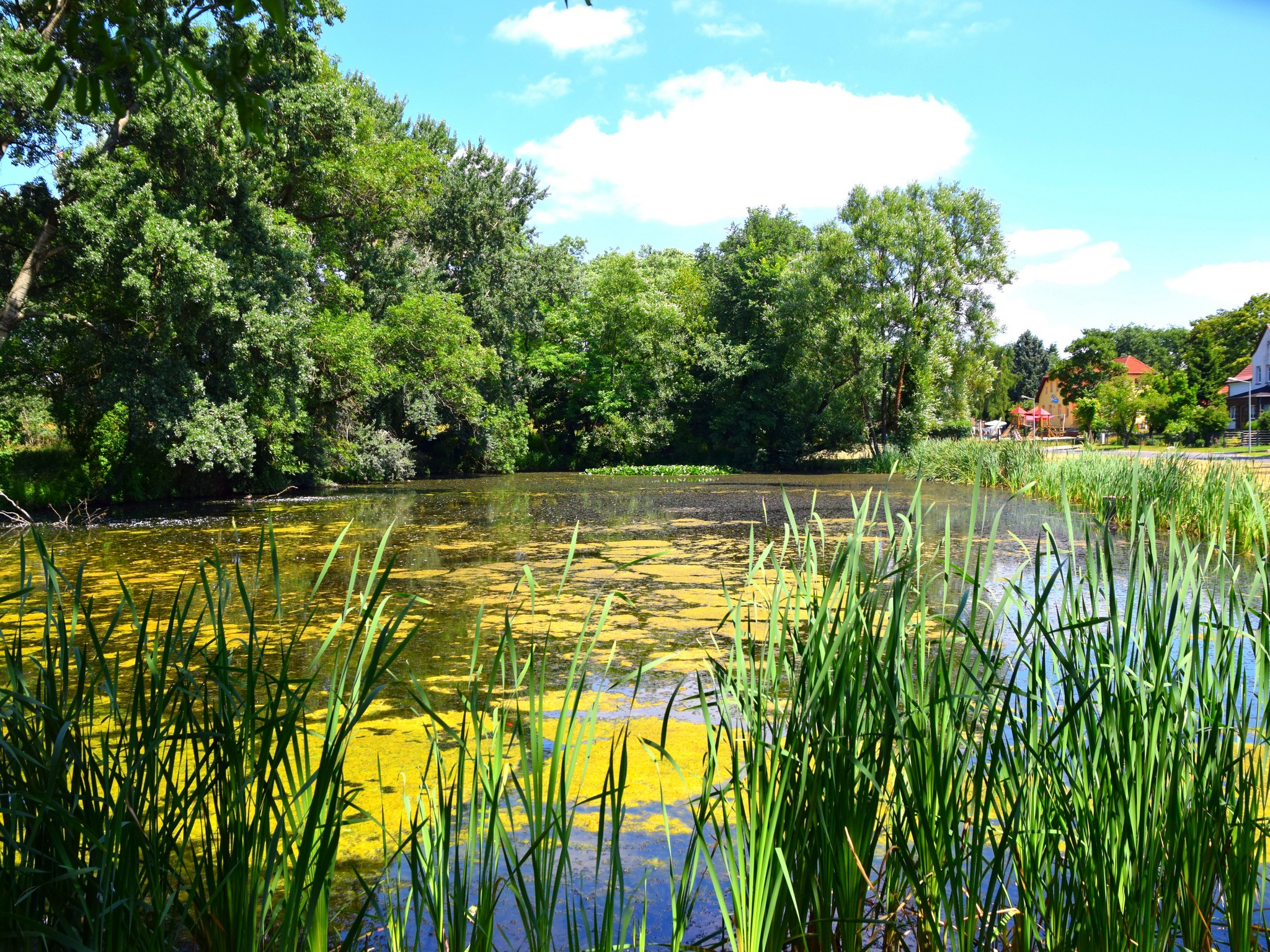 Großer Dorfsee, Frankfurt (Oder)-Lichtenberg